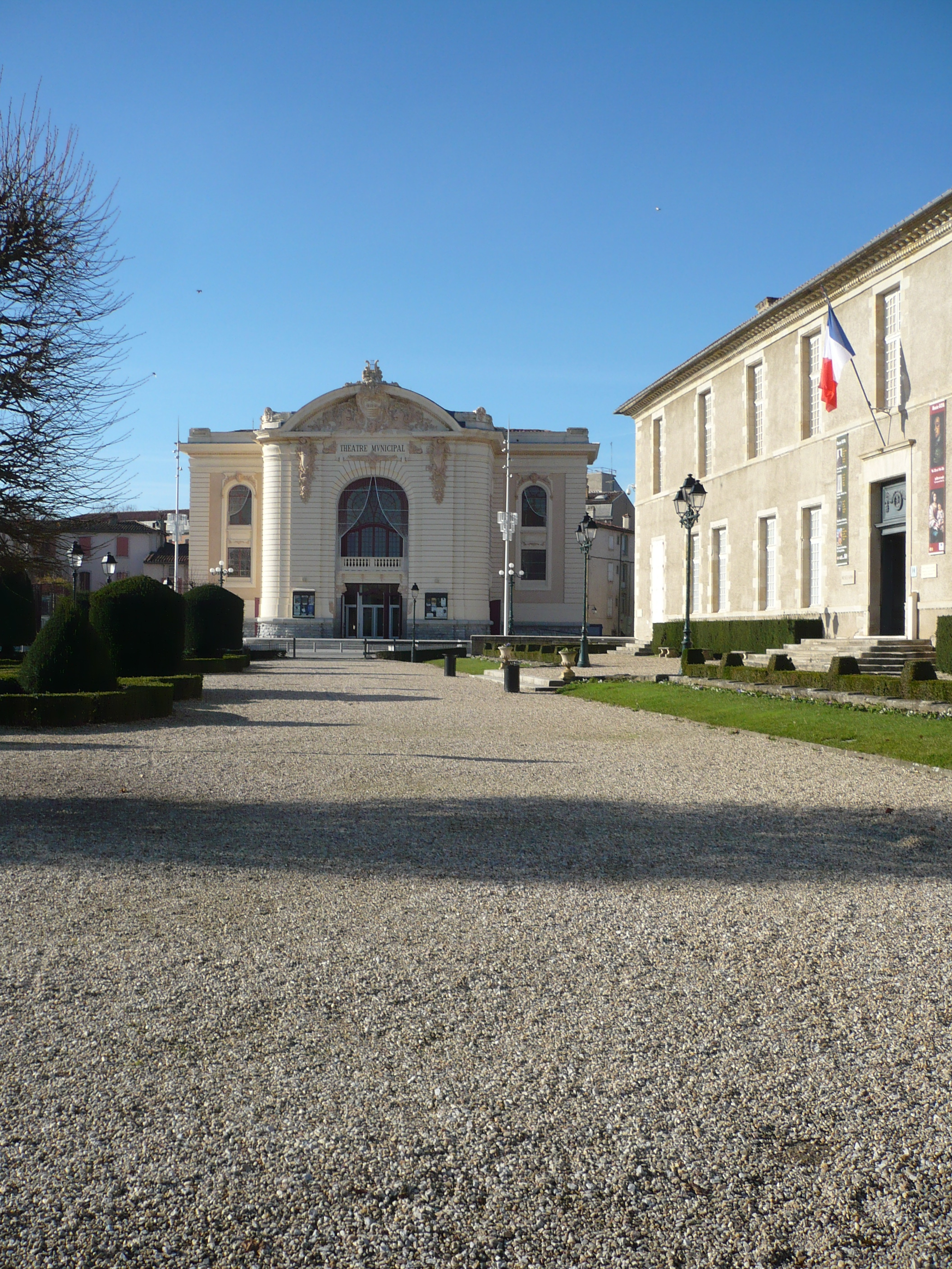 Théâtre de Castres